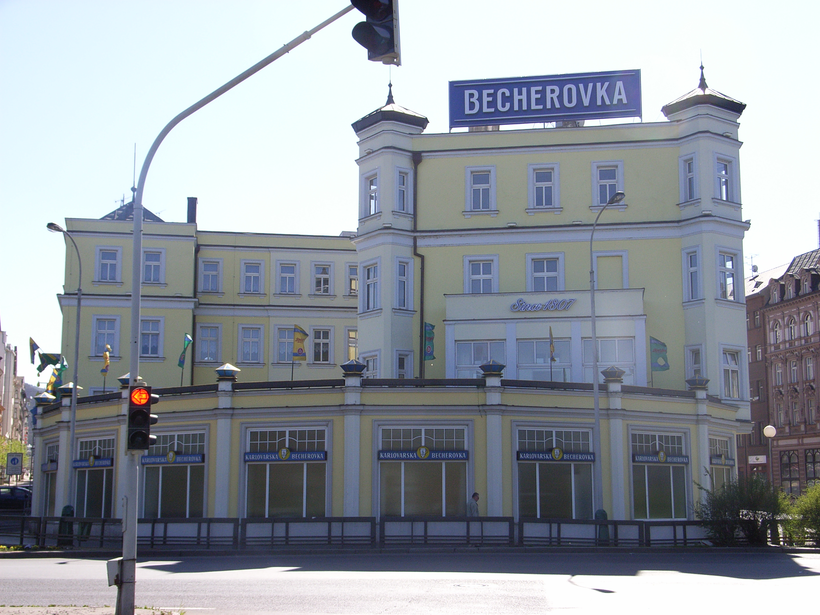 Sídlo výrobce karlovarské Becherovky v Karlových Varech